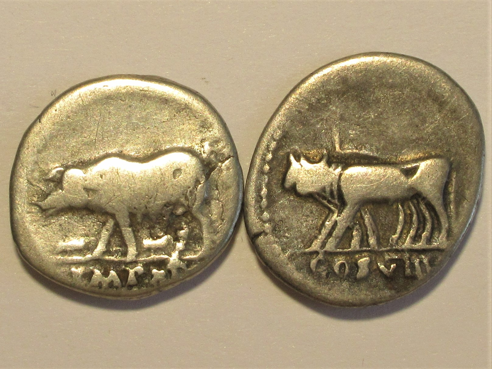 zwei Denare des Vespasian mit Bezug zu Koloniegründungen, Kampmann 20.45 und 38